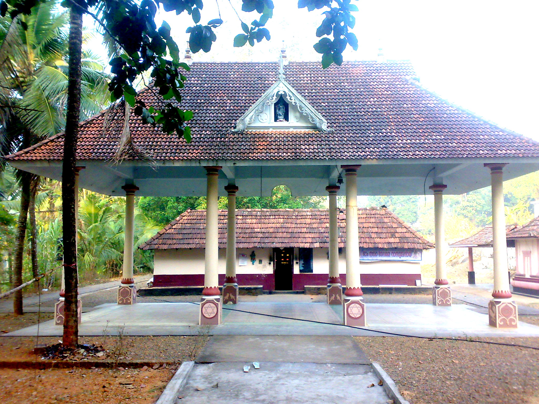 ത്രുപ്പൂരത്ത് ക്ഷേത്രം